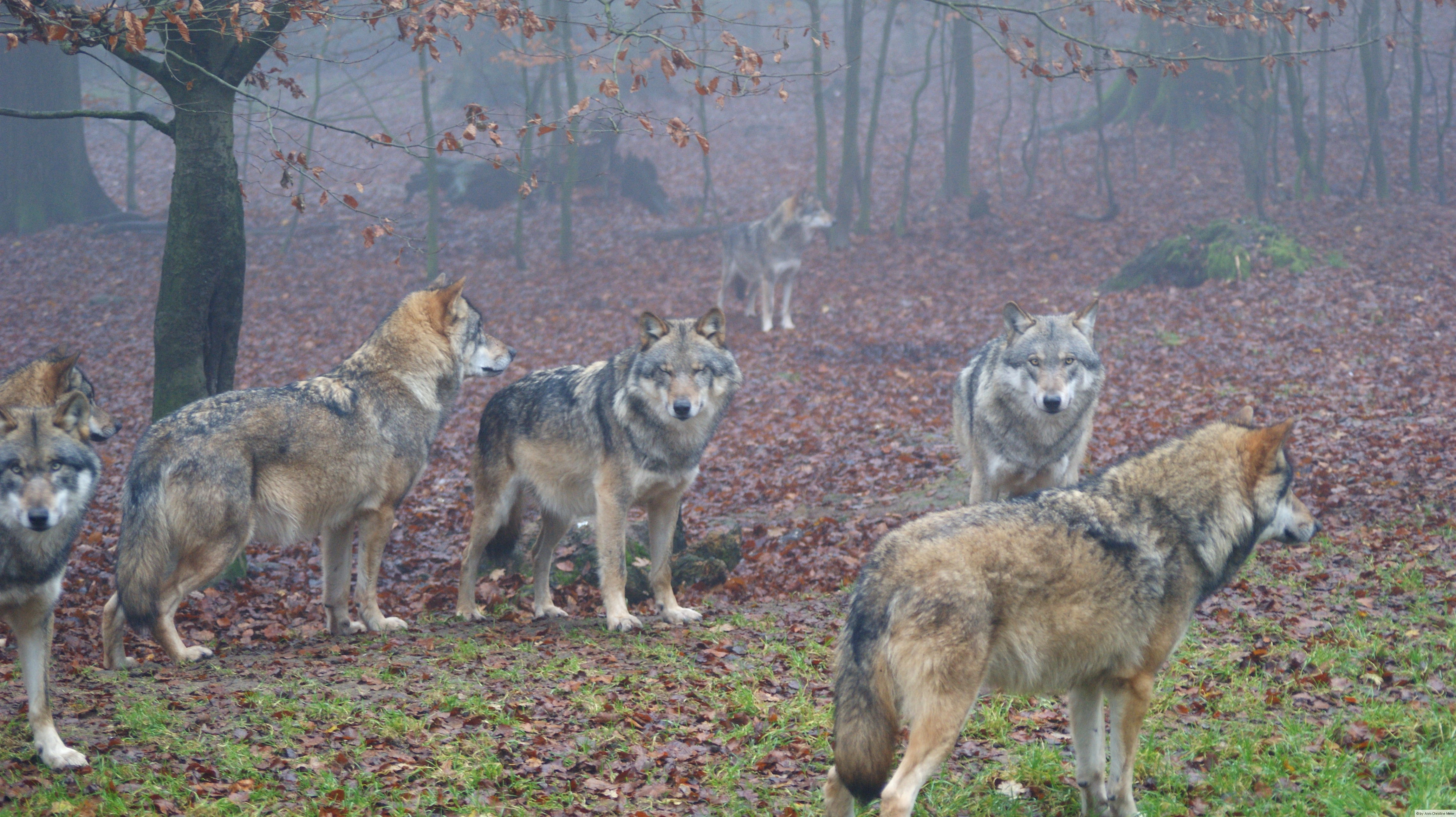 Rudel Eurasischer Wölfe (Canis lupus lupus) im Wildpark Neuhaus, Naturpark Solling-Vogler, Niedersachsen